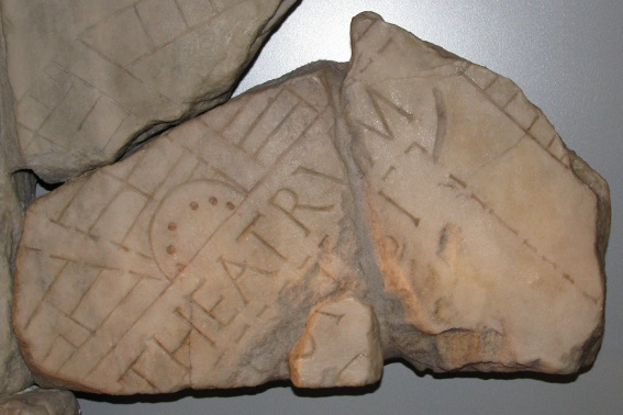 Fragments de la Forma Urbis, cavea du Theatrum Balbi - Musée Crypta Balbi à Rome